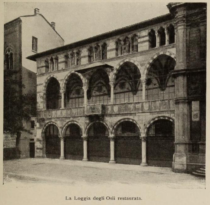 La Loggia degli Osii fotografata al termine del restauro, anno 1904